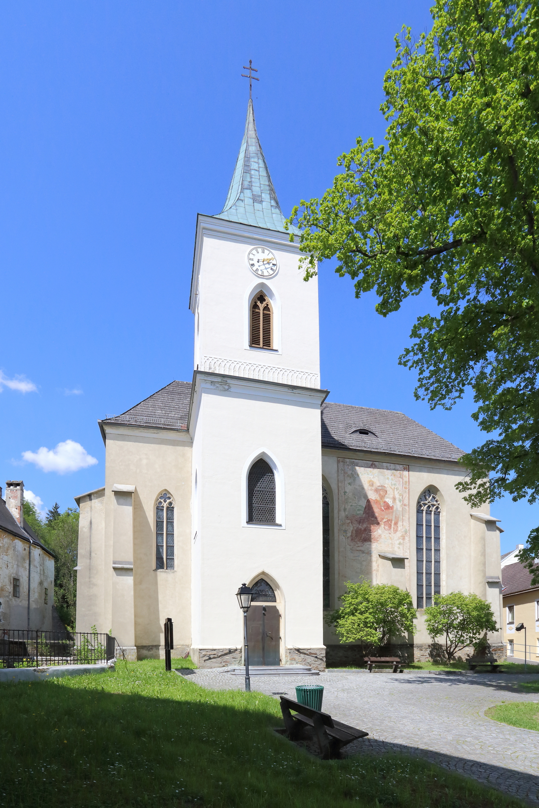 Katholische Pfarrkirche hl. Anna in der niederösterreichischen Marktgemeinde Pöggstall.